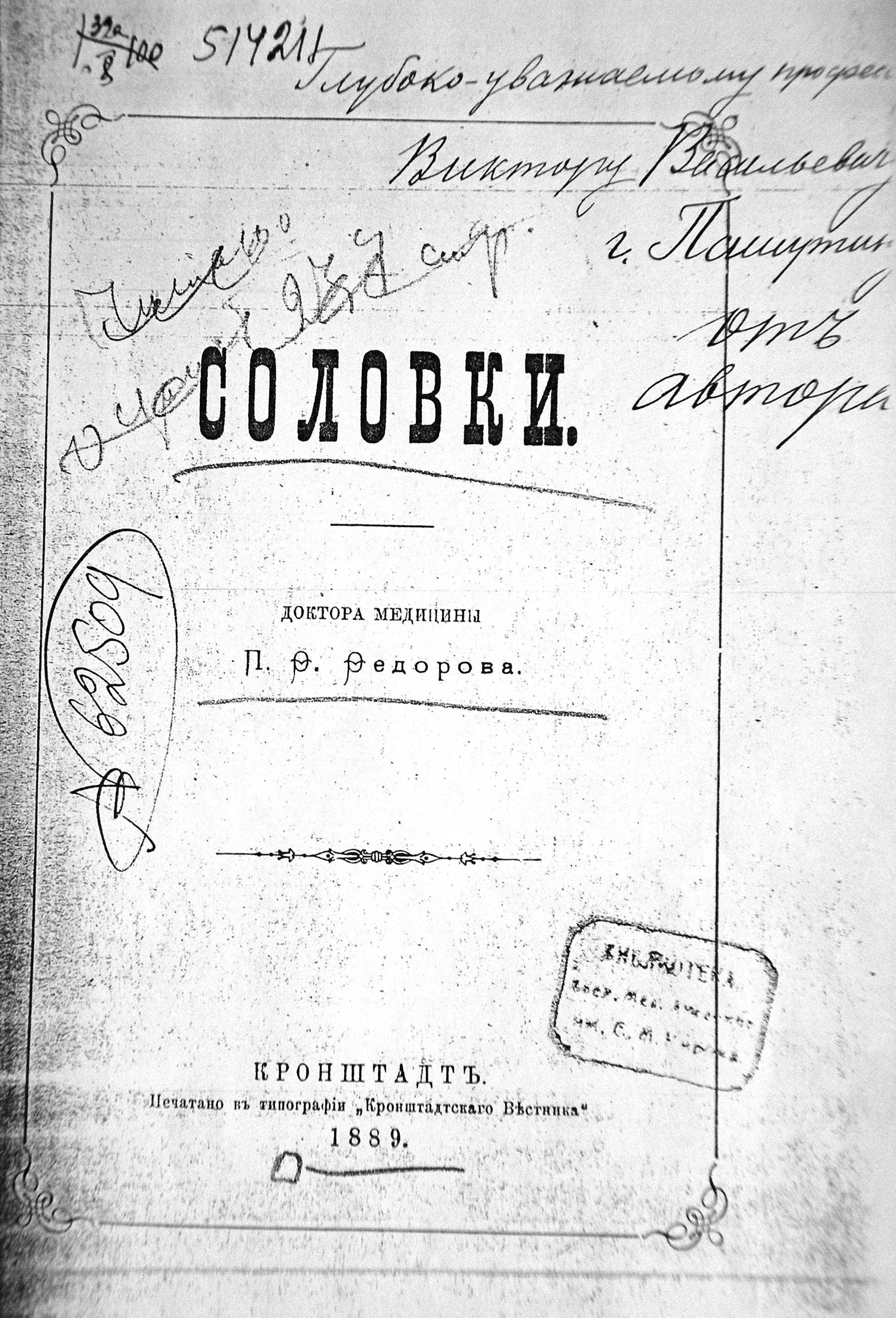 "Соловки"